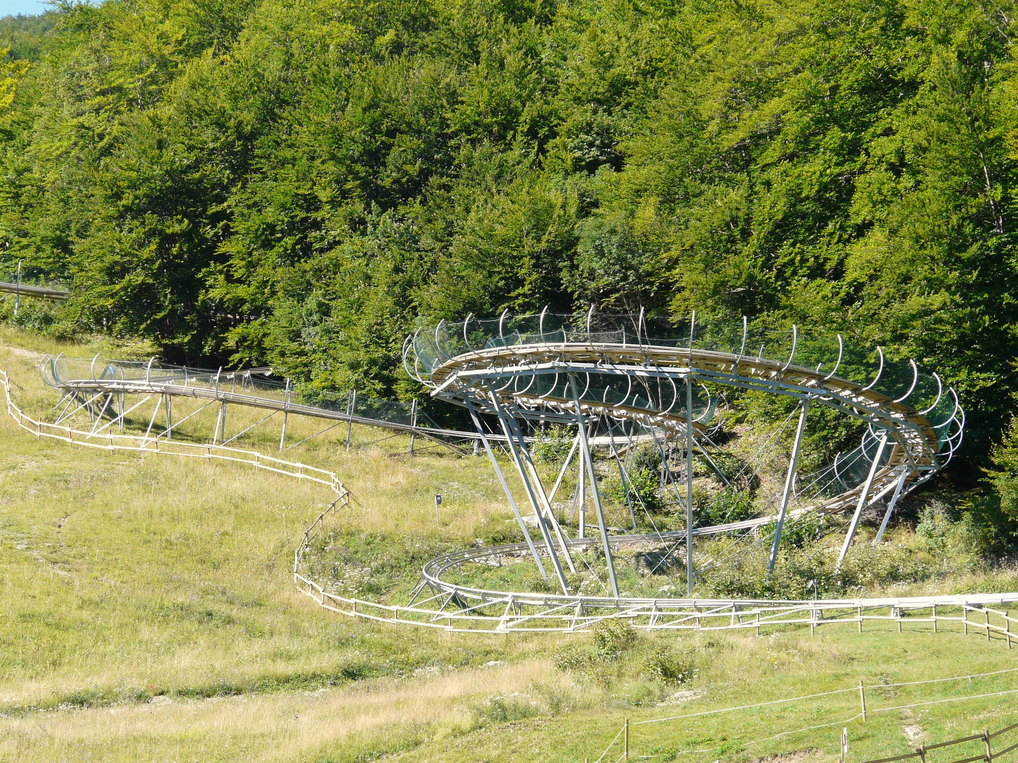 Tracciato del bob nel bosco presso la seggiovia Caldirola-Monte Gropà, Caldirola, Comune di Fabbrica Curone, Piemonte, Italia